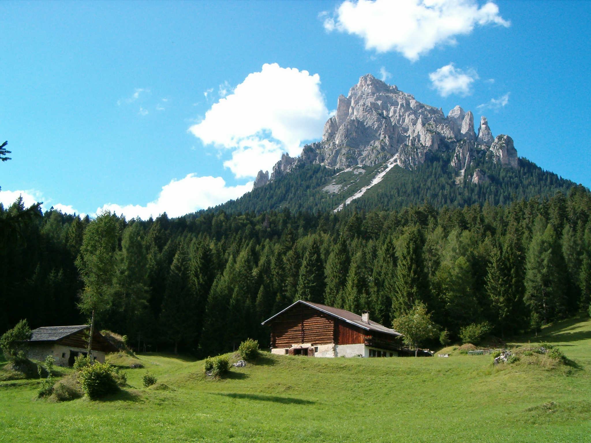 Prati Piereni ai piedi del Monte Cimerlo (Gruppo Pale di San Martino), Primiero, Trentino